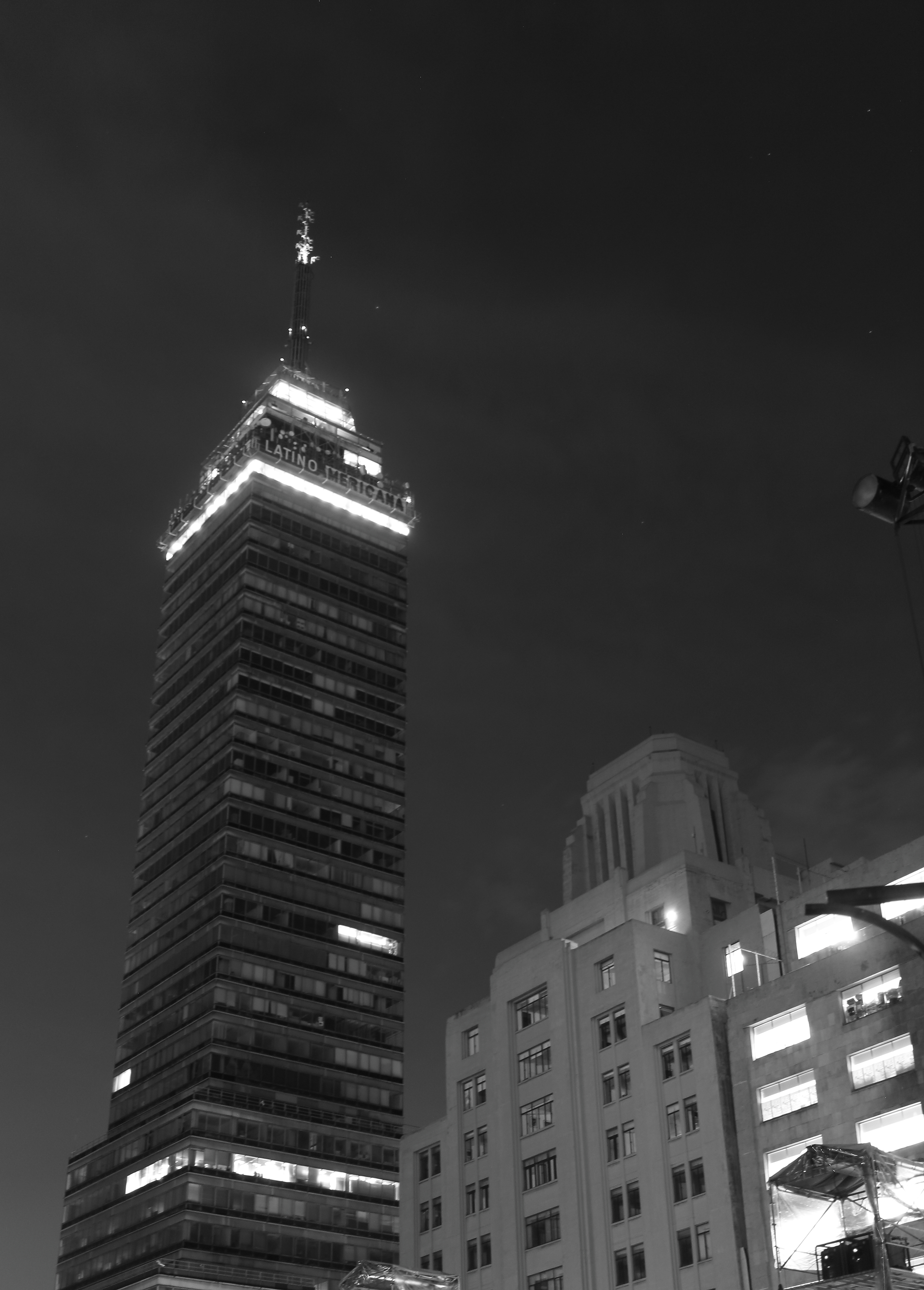 Torre Latinoamericana durante la noche.